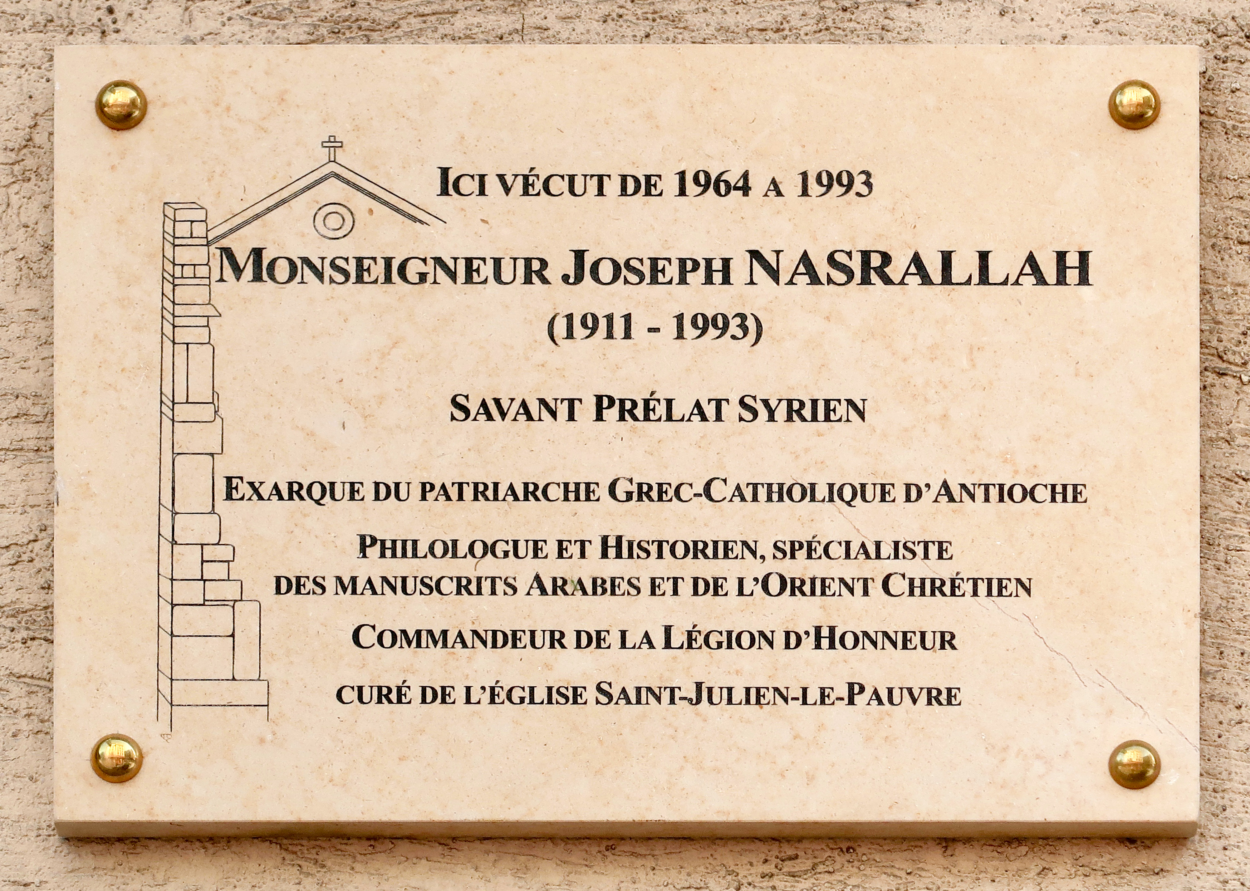 Plaque en hommage à Joseph Nasrallah, 79 rue Galande (Paris, 5e).